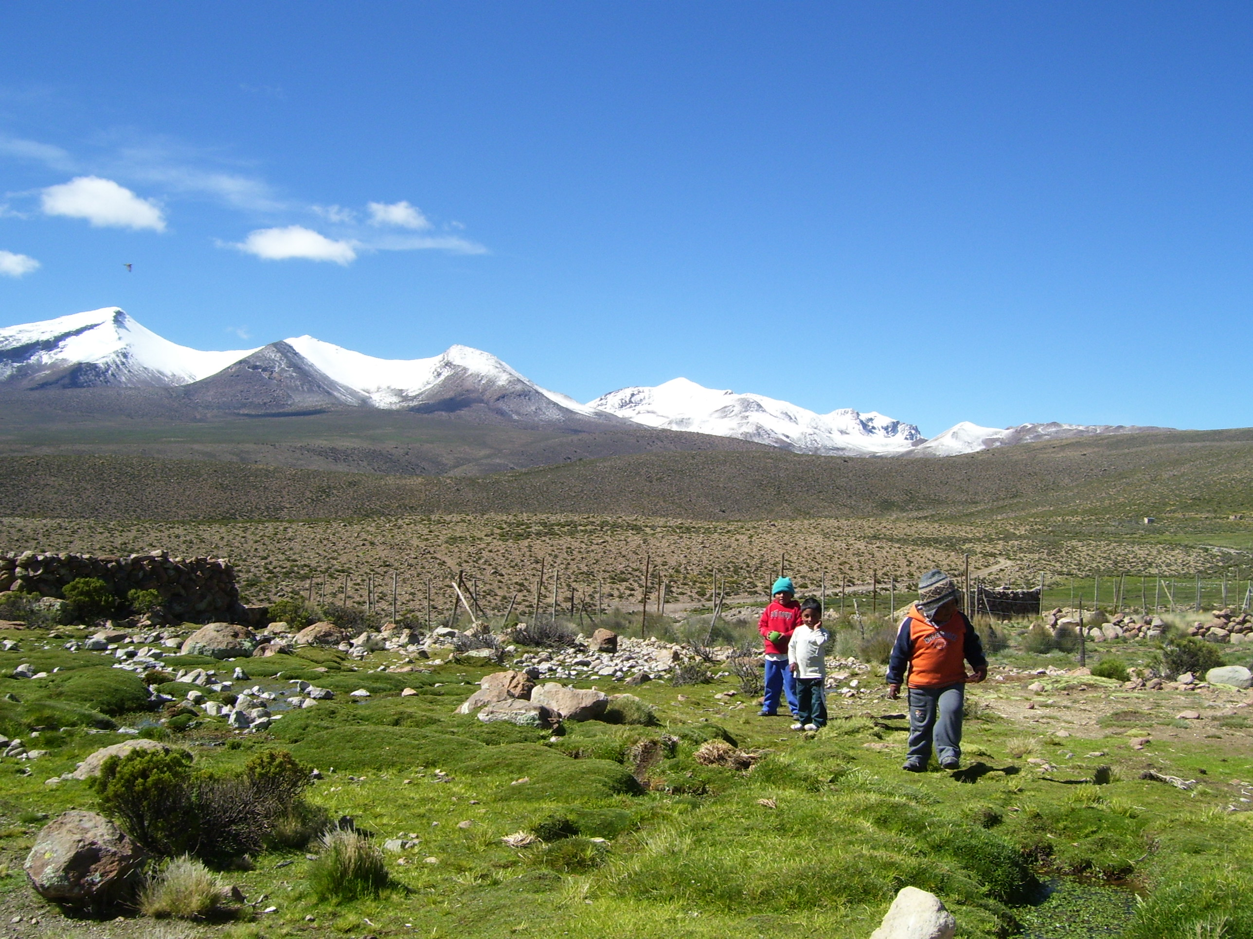 Niños aymaras caminando en las alturas del altiplanos a 4.175 metros sobre el nivel del mar; en Cosapilla, un pueblo altiplánico de Chile.